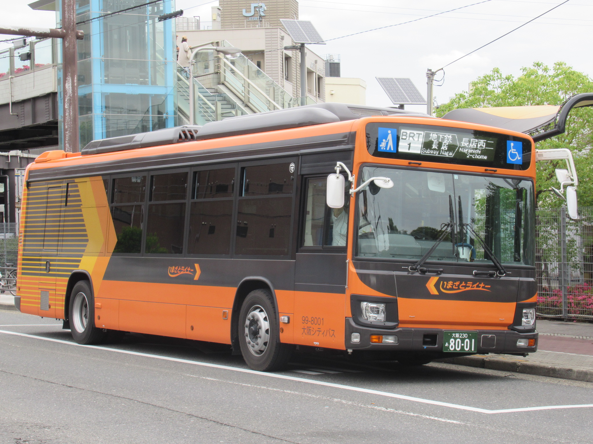 いまざとライナーの車両 99-8001 杭全停留所